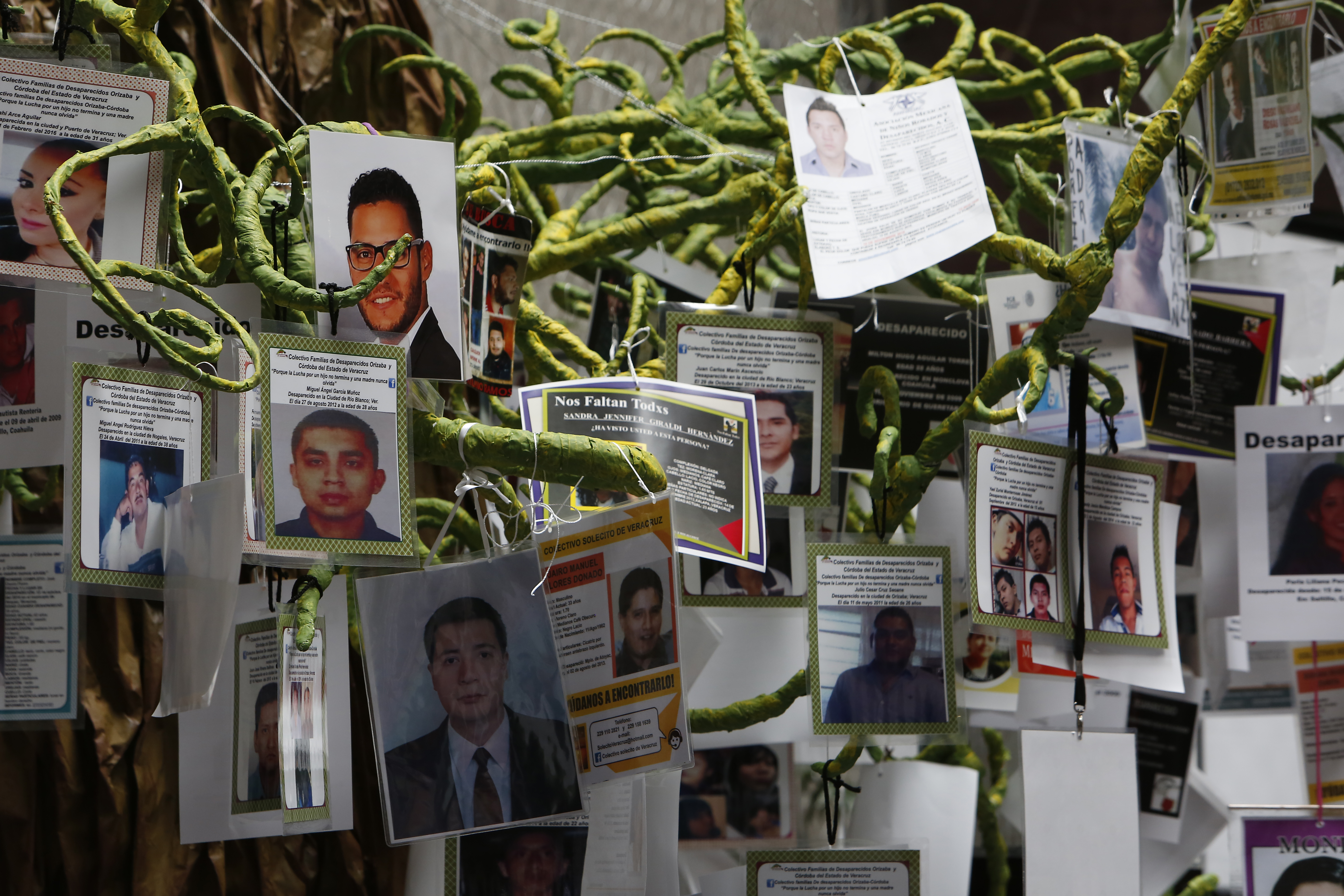 30 de agosto de 2017 - Día Internacional de las Víctimas de Desapariciones Forzadas El Mecanismo de Seguimiento a la medida cautelar otorgada a favor de los estudiantes de la escuela rural “Raúl Isidro Burgos” de Ayotzinapa y a las recomendaciones del Grupo Interdisciplinario de Expertos Independientes (GIEI) llevó a cabo su tercera visita oficial a México entre el 28 y el 30 de agosto de 2017. La delegación estuvo compuesta por la Relatora de la CIDH para México y coordinadora del Mecanismo de Seguimiento, Esmeralda Arosemena de Troitiño, y personal técnico de la Secretaría Ejecutiva de la CIDH. Créditos fotográficos: Ginnette Riquelme / CIDH